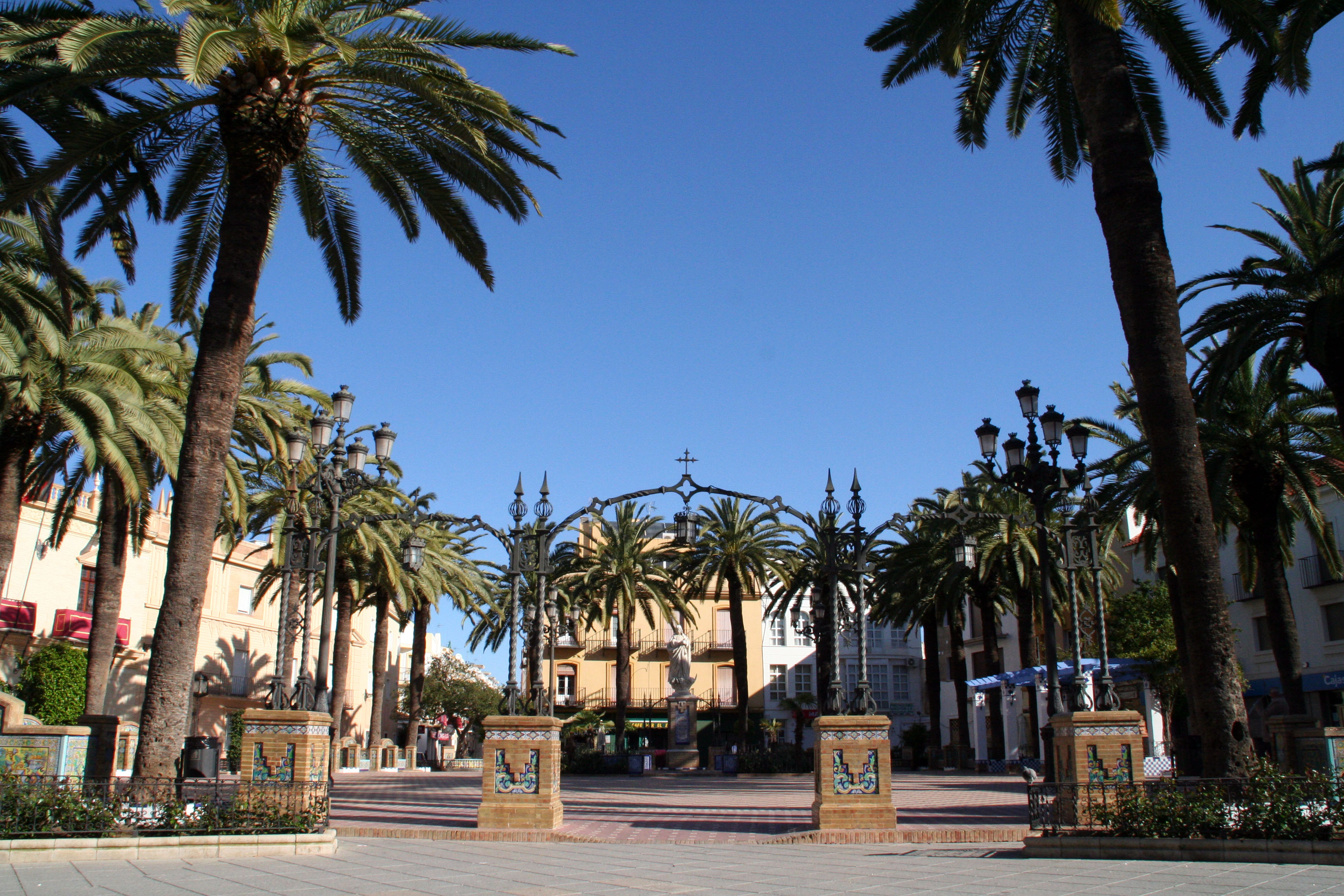 Plaza de la Laguna. Ayamonte. Huelva. España.